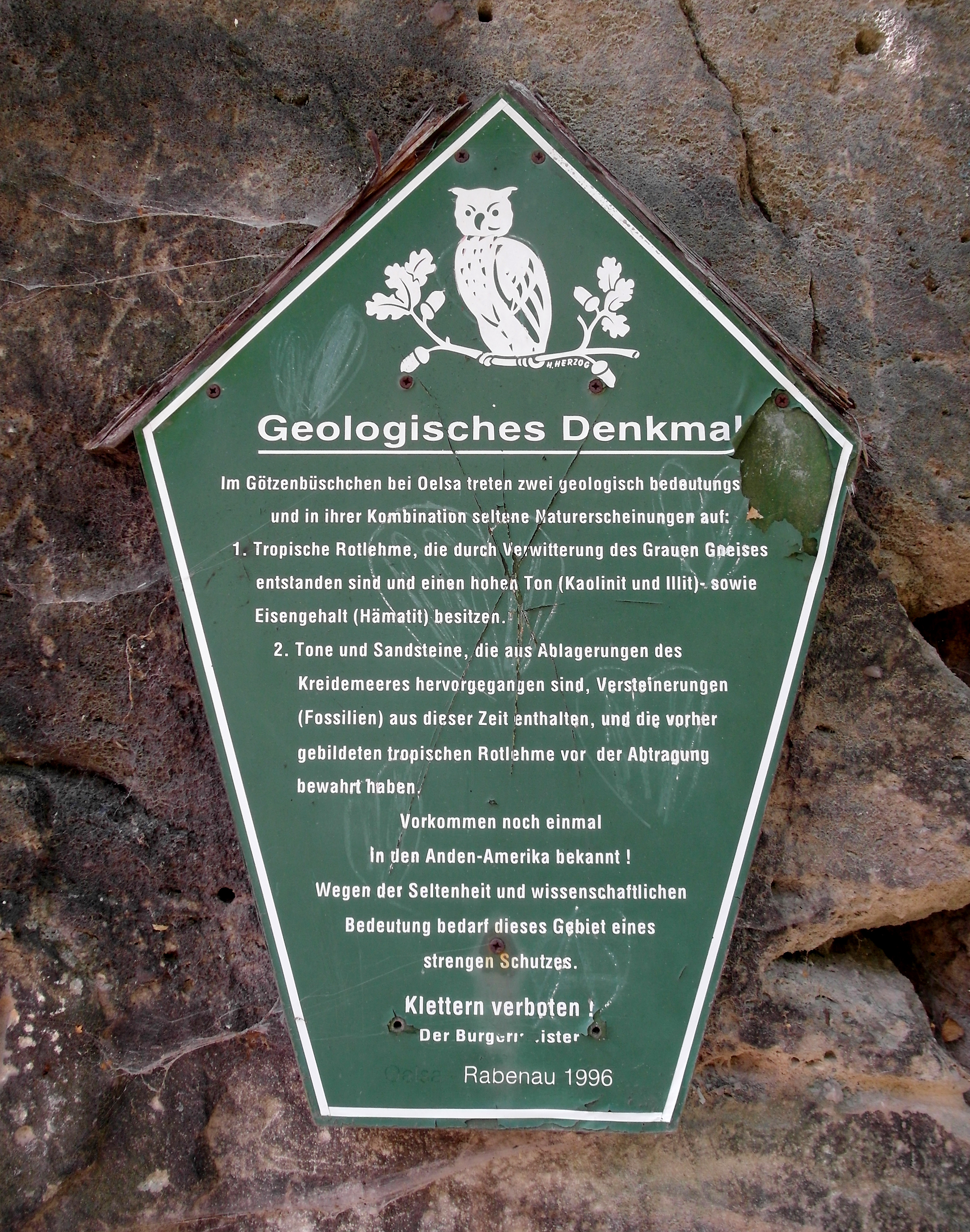 21.08.2019 01734 Oelsa (Rabenau), Am Götzenbüschchen (GMP: 50.948711,13.655640): Hier treten zwei geologisch bedeutungsvolle und in ihrer Kombination seltene Naturerscheinungen auf: 1. Tropische Rotlehme, die durch Verwitterung des Grauen Gneises entstanden sind und einen hohen Ton (Kaolinit und Illit) - sowie Eisengehalt (Hämatit) besitzen. 2. Tone und Sandsteine, die aus Ablagerungen des Kreidemeeres hervorgegangen sind, Versteinerungen (Fossilien) aus dieser Zeit enthalten, und die vorher gebildeten tropischen Rotlehme vor der Abtragung bewahrt haben. [SAM091.JPG]20190821125DR.JPG(c)Blobelt